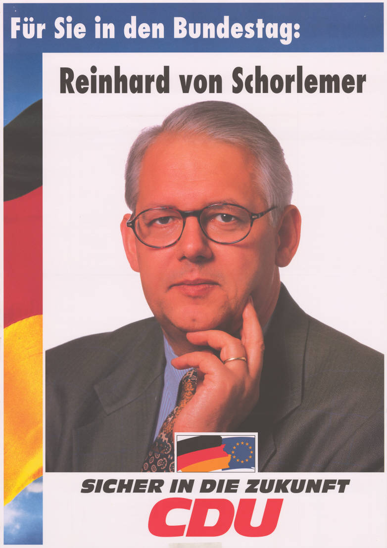 Für Sie in den Bundestag: Reinhard von Schorlemer Sicher in die Zukunft CDU Abbildung: Porträtfoto - Nationalfarben Plakatart: Kandidaten-/Personenplakat mit Porträt Objekt-Signatur: 10-001 : 4092 Bestand: Plakate zu Bundestagswahlen (10-001) GliederungBestand10-18: Plakate zu Bundestagswahlen (10-001) » Die 13. Bundestagswahl am 16. Oktober 1994 » CDU » Mit Porträtfoto Lizenz: KAS/ACDP 10-001 : 4092 CC-BY-SA 3.0 DE